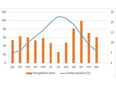 Graphique de Roquemaure